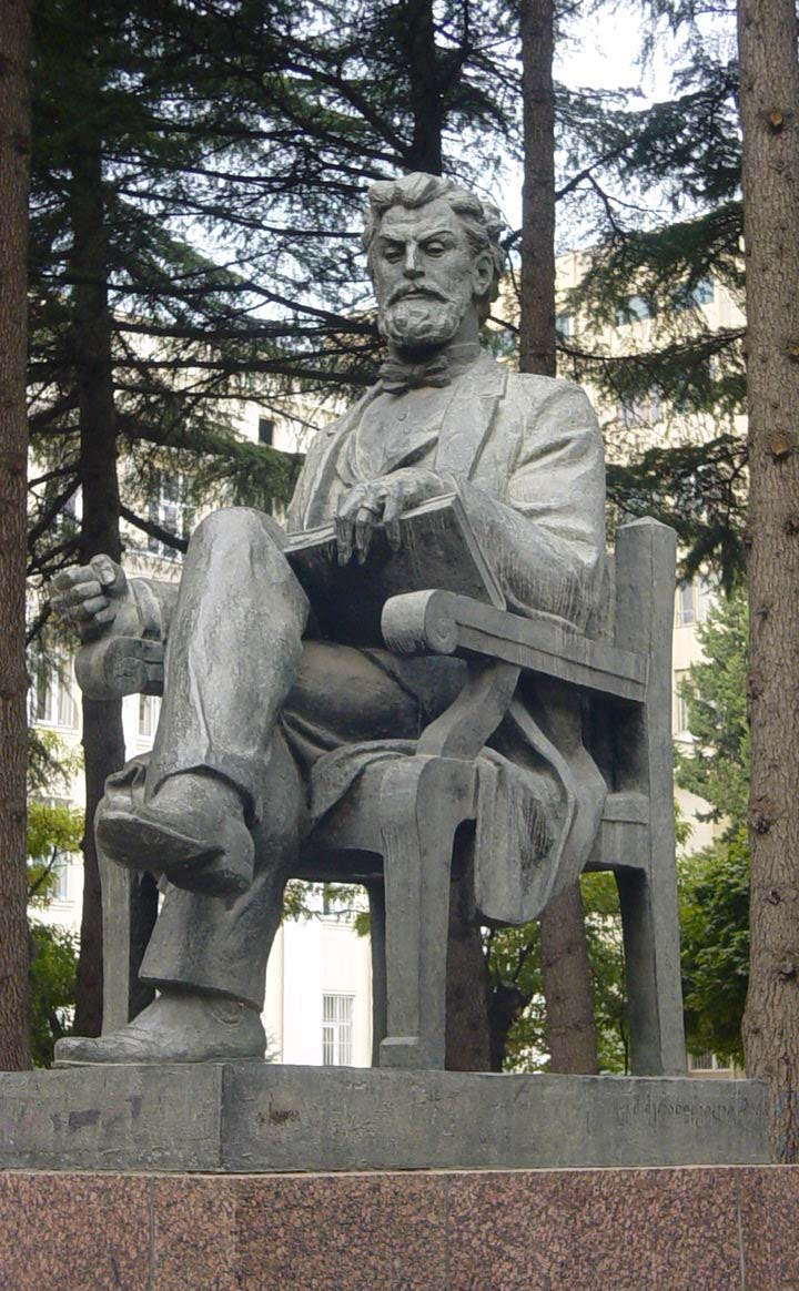 Памятник